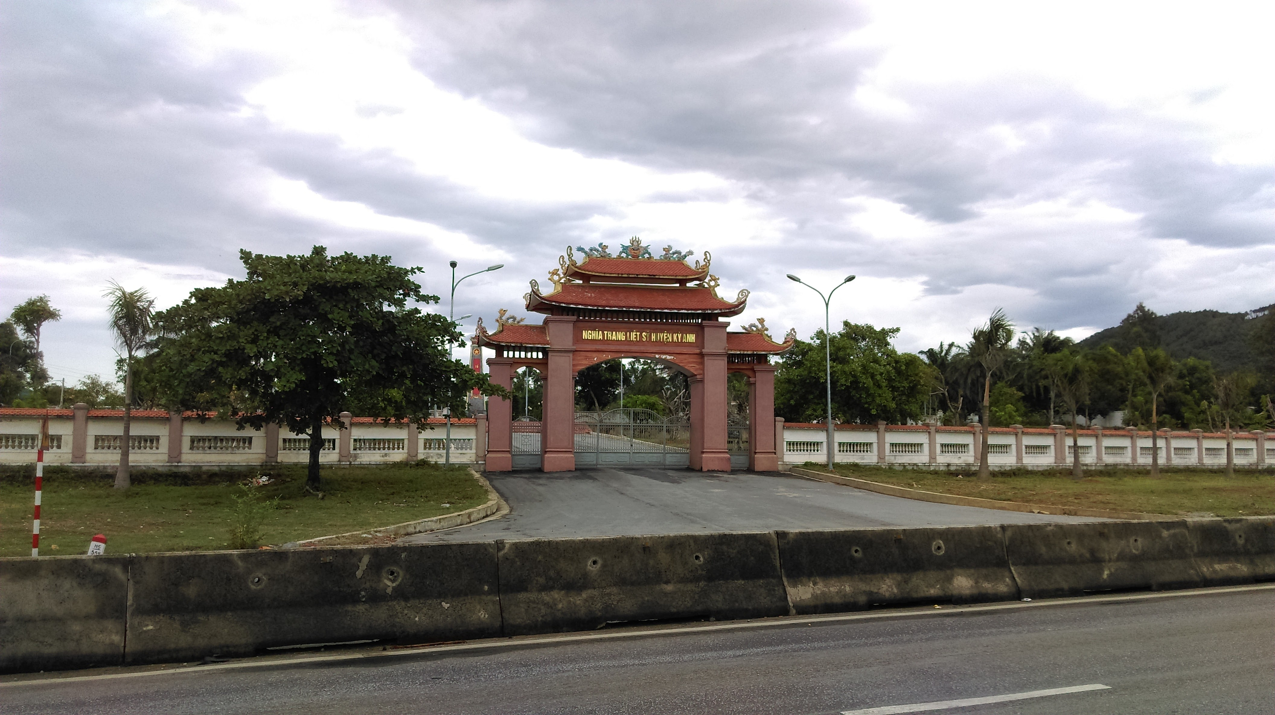 Nghĩa trang Liệt sĩ huyện Kỳ Anh, Hà Tĩnh